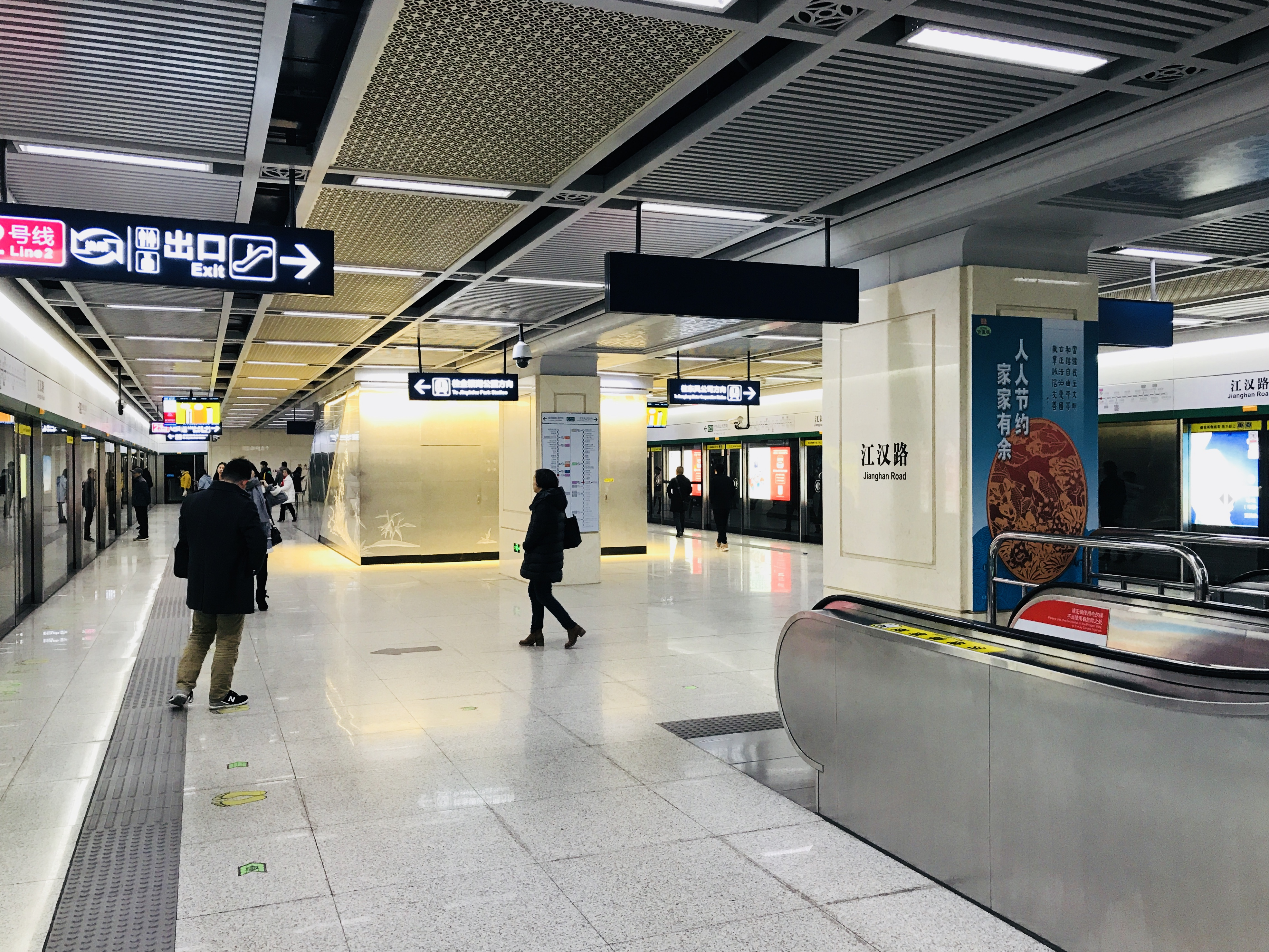 武汉轨道交通6号线江汉路站月台